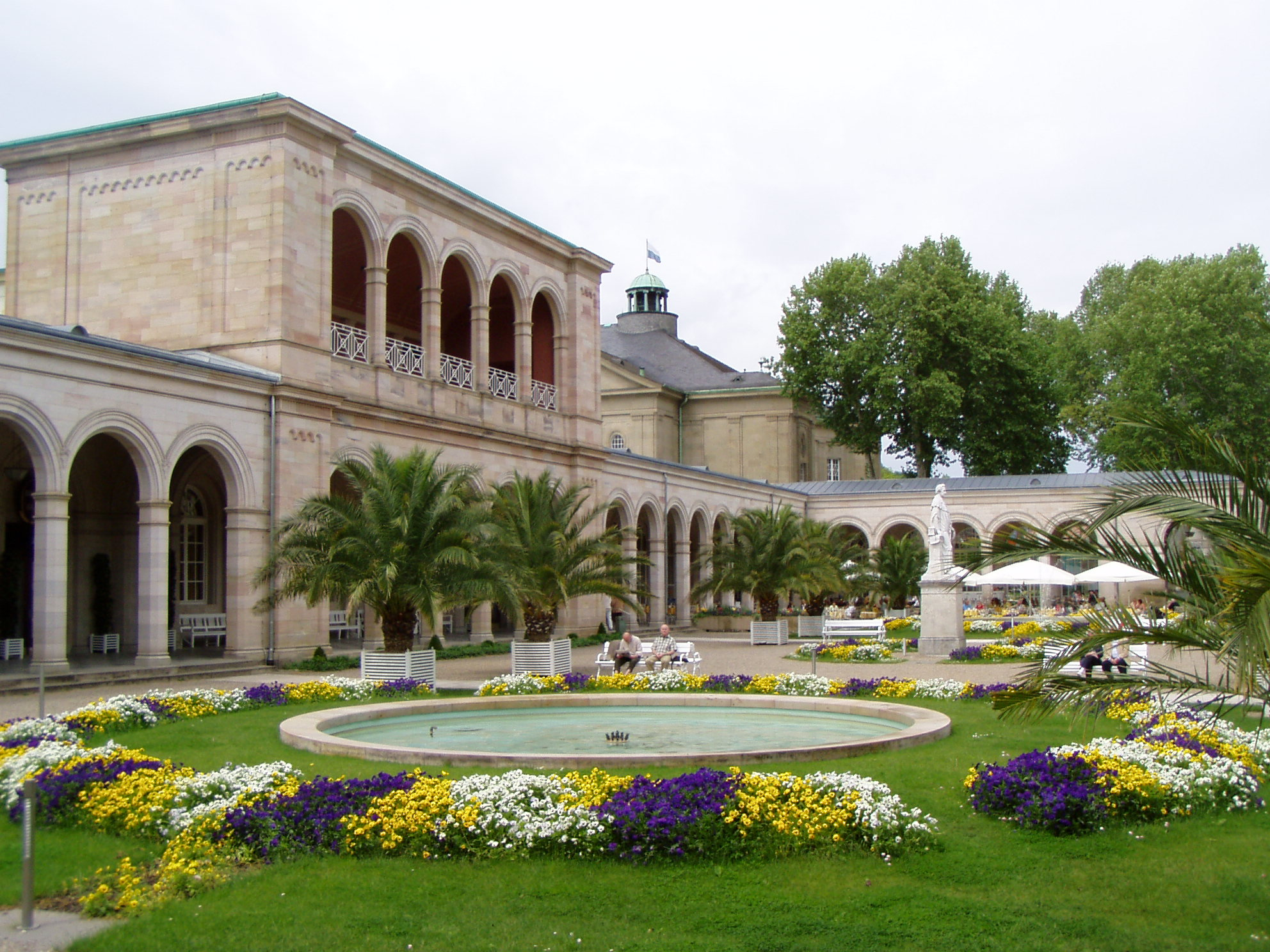 Public garden in Bad Kissingen, Bavaria